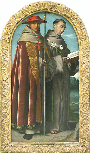 Moretto, santi bonaventura e antonio